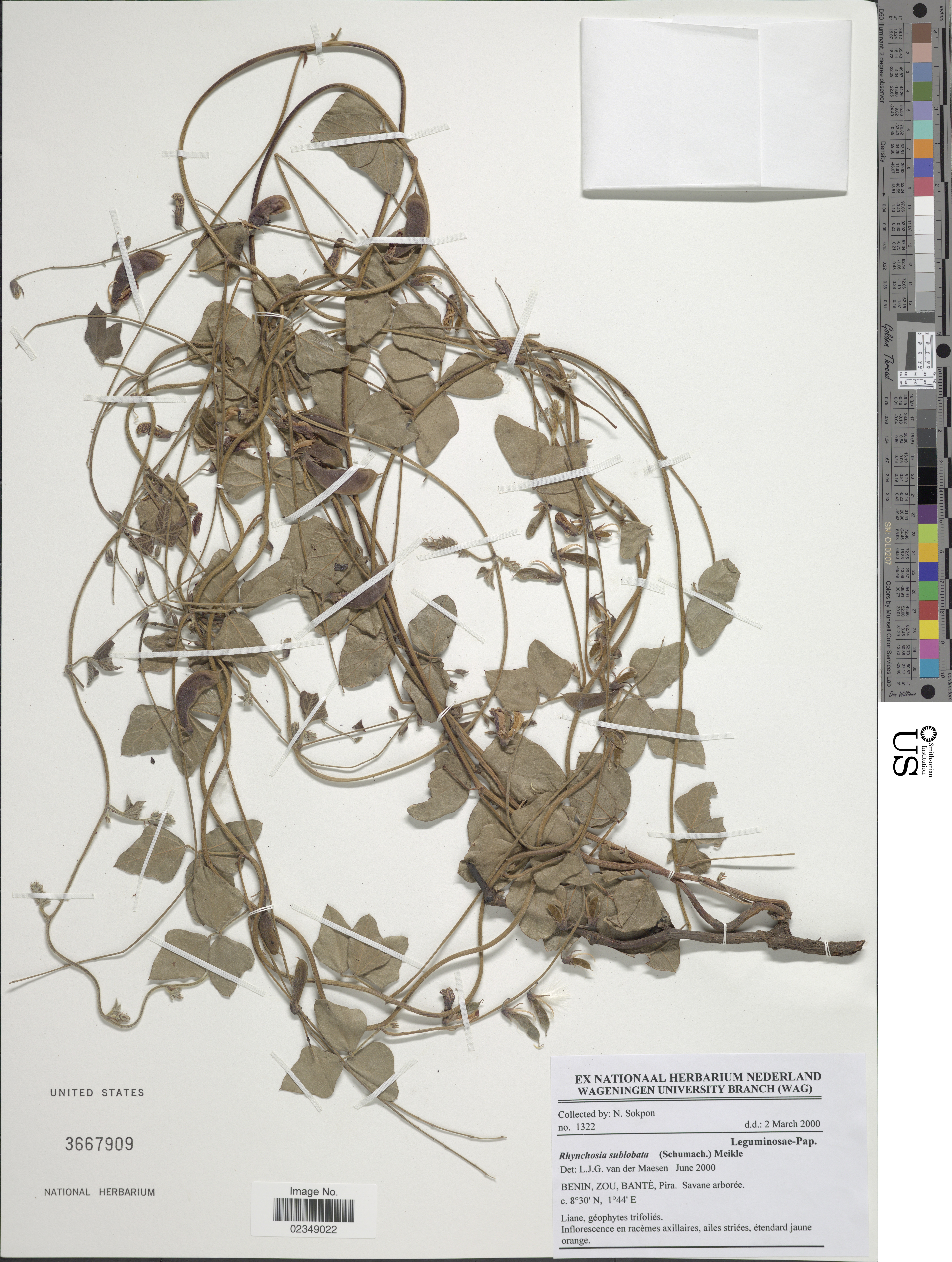 Rhynchosia sublobata (Schumach.) Meikle Object Details Biogeographical Region 22 - West Tropical Africa Collector N. Sokpon Record Last Modified 3 Nov 2017 Specimen Count 1 Collection Date 2 Mar 2000 Barcode 02349022 USNM Number 3667909 Place Bante, Pira, Savane arboree, Zou, Benin, Africa Published Name Rhynchosia sublobata (Schumach.) Meikle Taxonomy Plantae Dicotyledonae Rosales Fabaceae Faboideae NMNH - Botany Dept. Record ID nmnhbotany_13652987 Usage of Metadata (Object Detail Text) CC0 GUID (Link to Original Record)